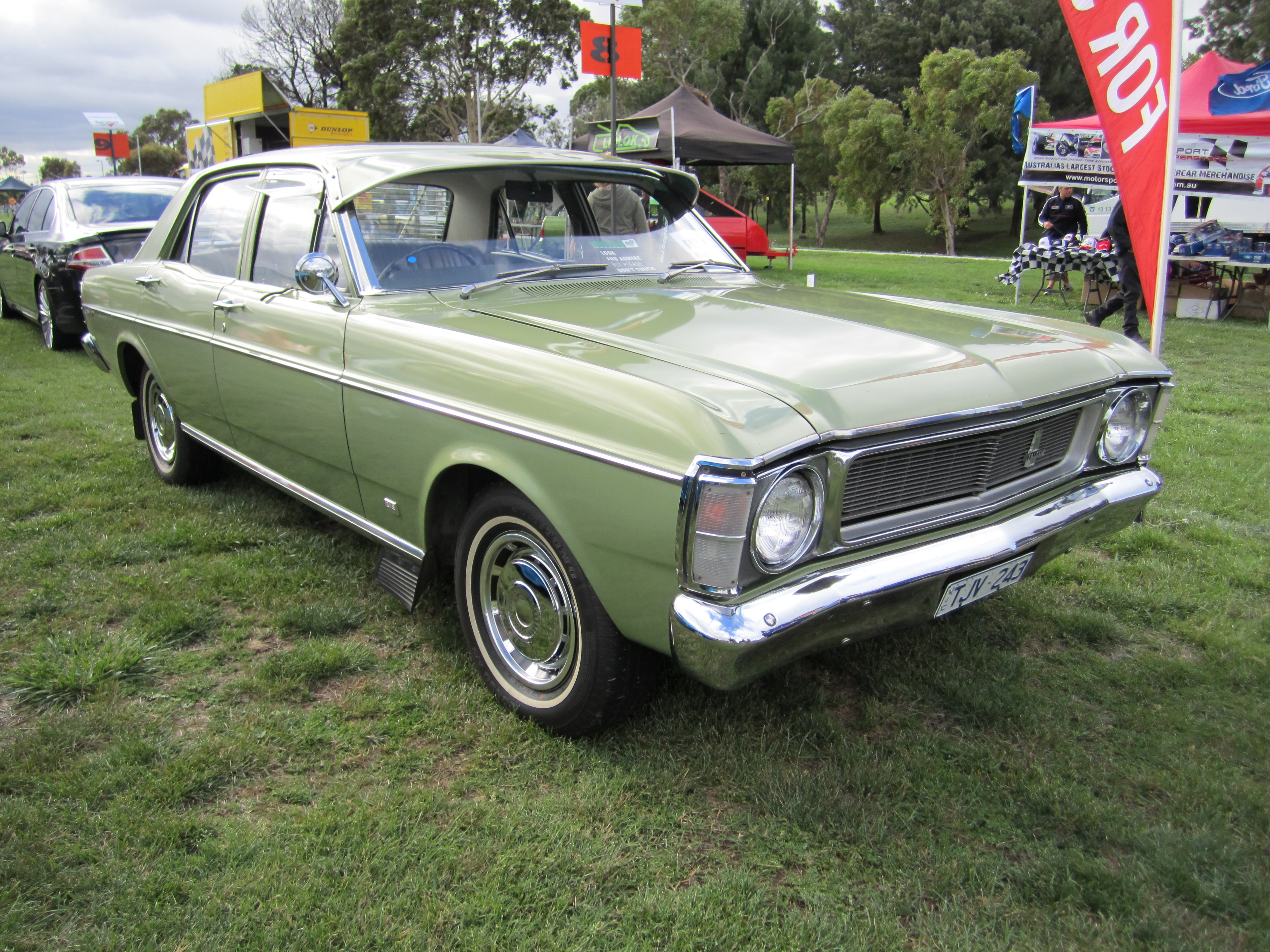 1970 Ford XW Falcon